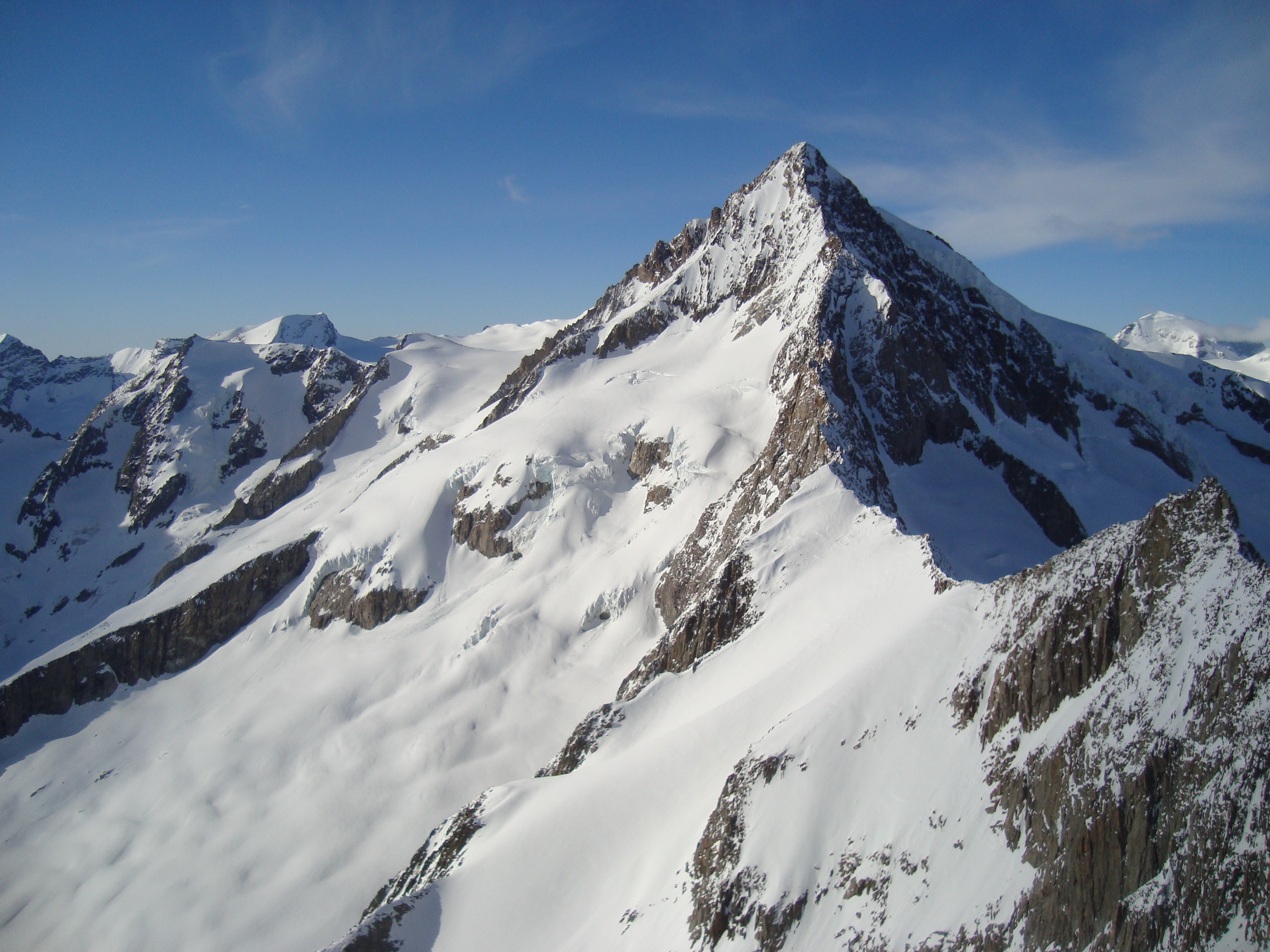 Aletschhorn (4193m)